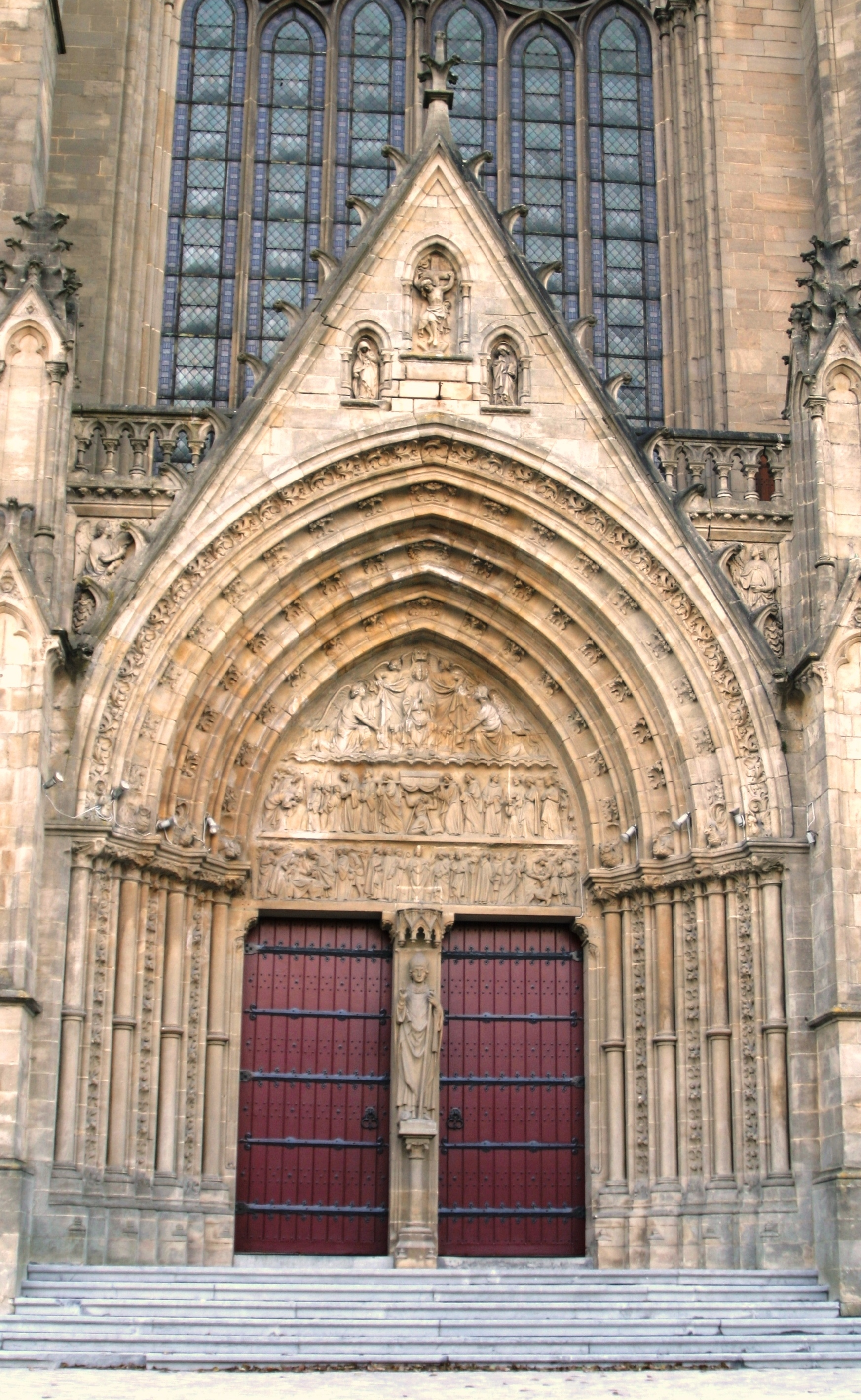 D'Haaptportal vun der Areler Kierch St. Martin (Belsch).